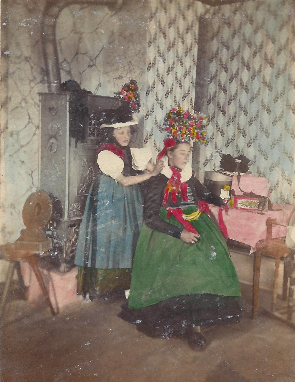 Ludovico Wolfgang Hart, getintete Fotographie N° 87, aus der Galerie universelle des Peuples: St. Georgen Tracht, Anlegen des Schäpels, 1864